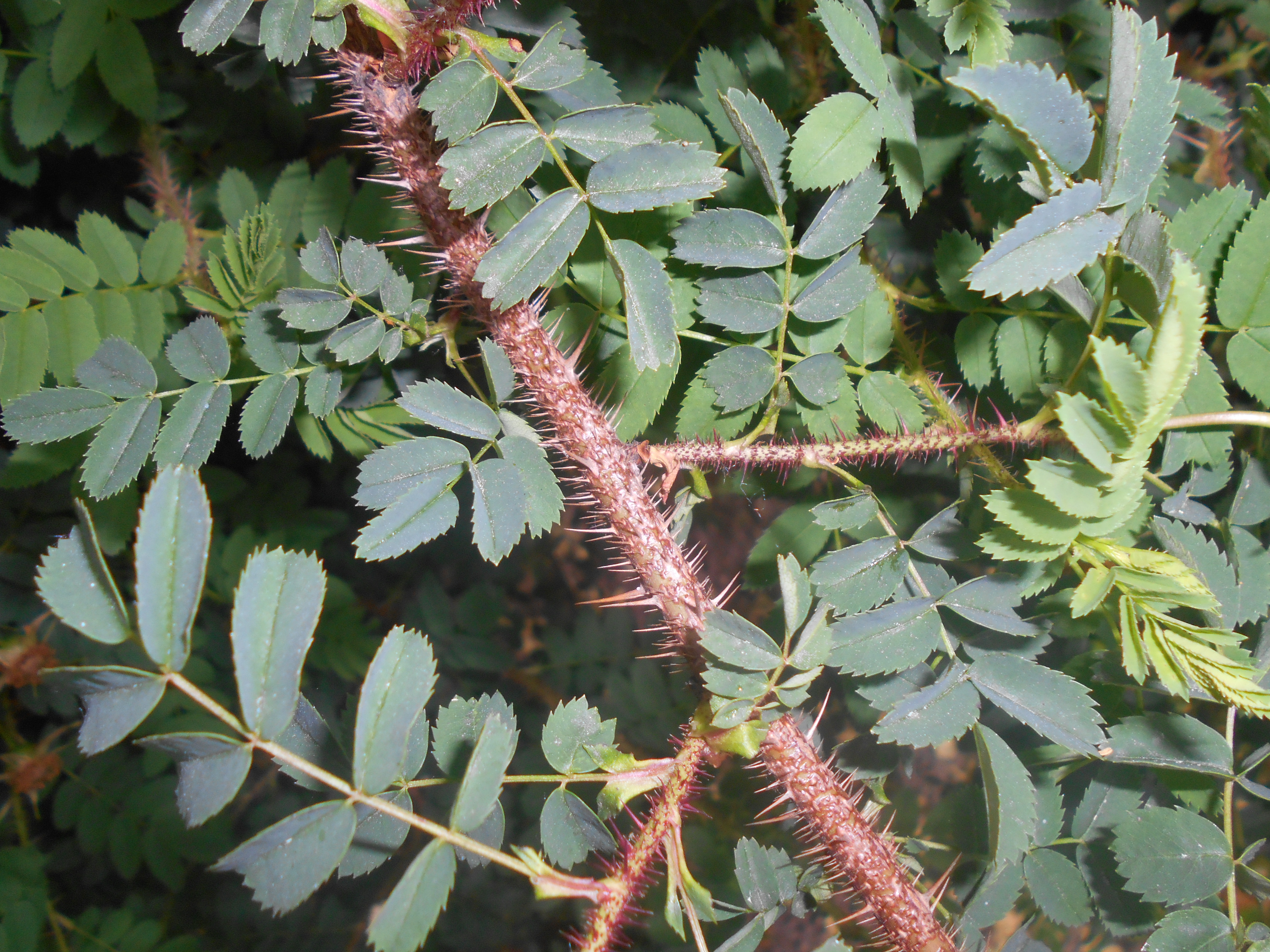 Róża gęstokolczasta (Rosa spinosissima), Ogród Botaniczny UMCS w Lublinie.